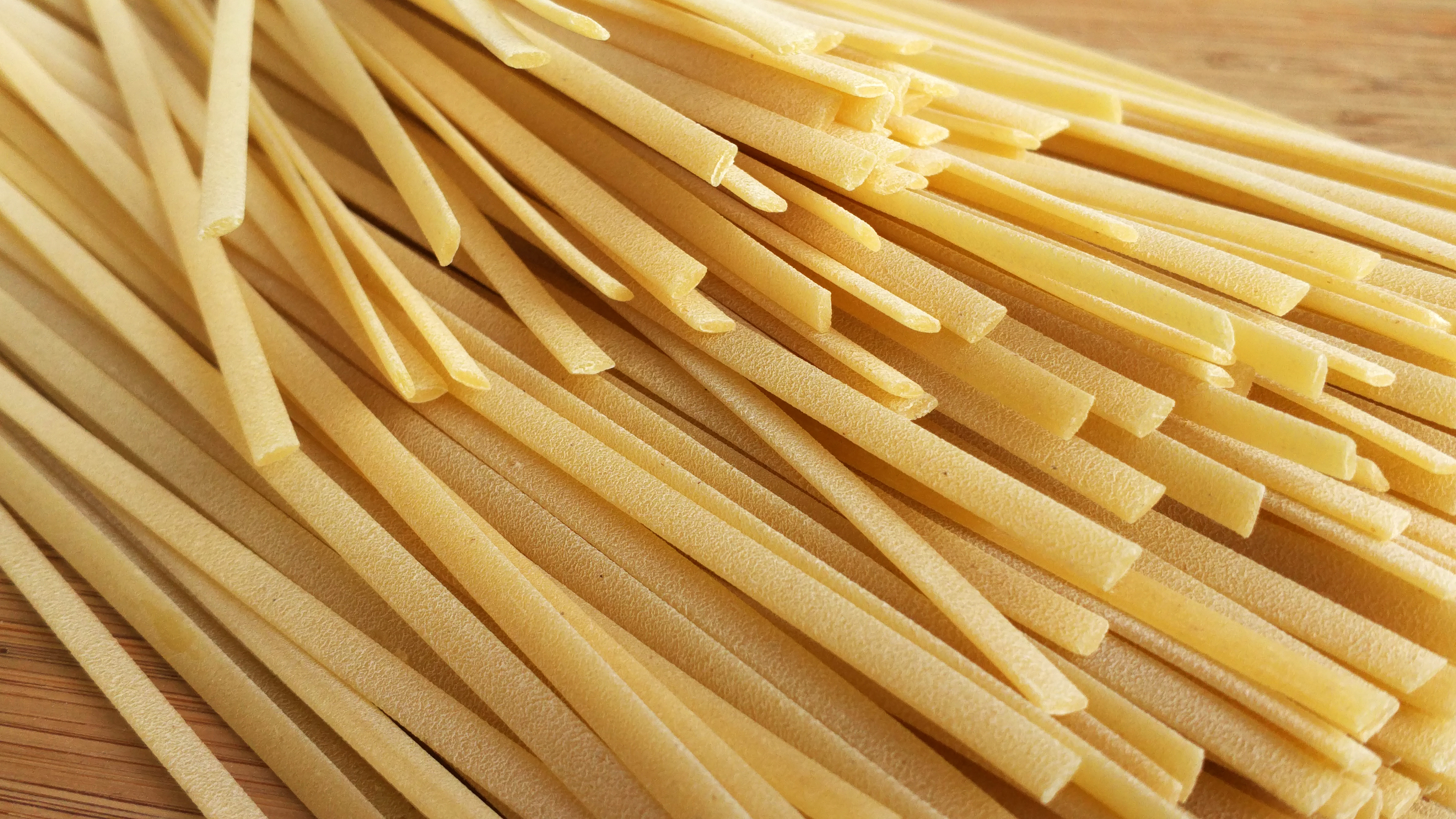 Trenette, a type of italian pasta